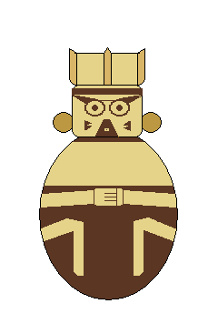 Representación gráfica de un huaco China o Barrigón de la Cultura Chancay.